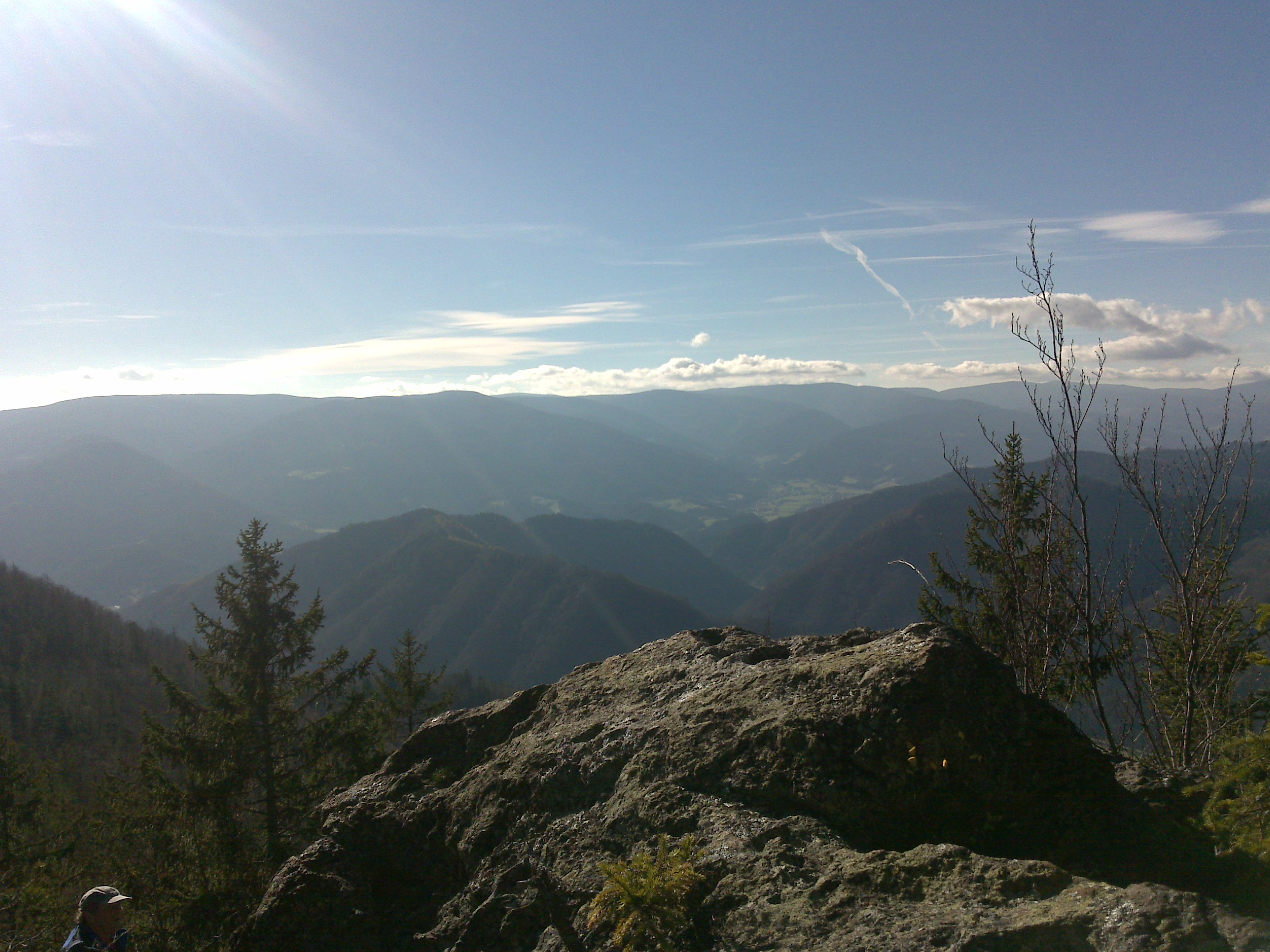 Zg. Boč - pogled proti Pohorju